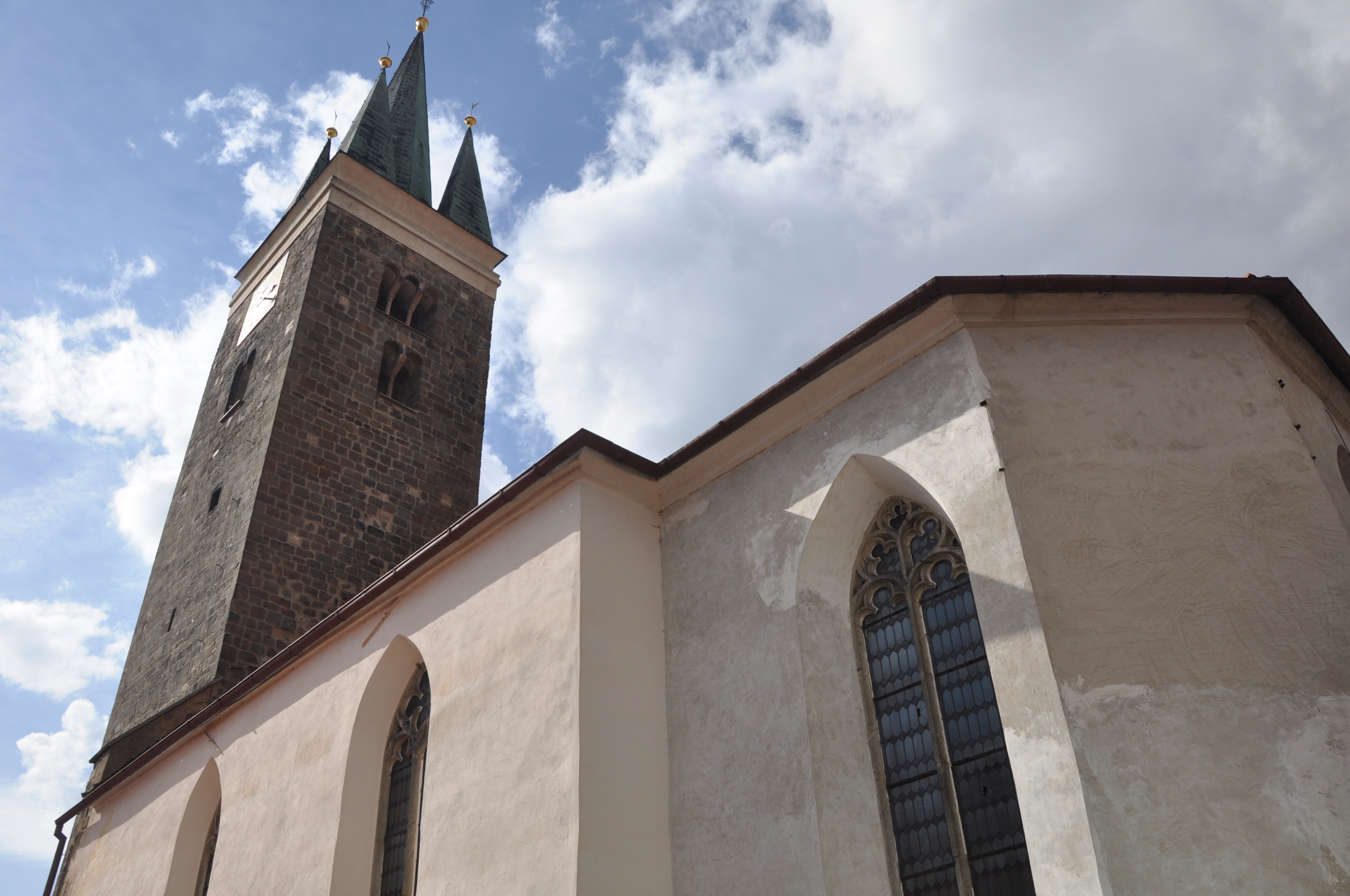 Kostel a věž sv. Ducha, foceno z dvorku